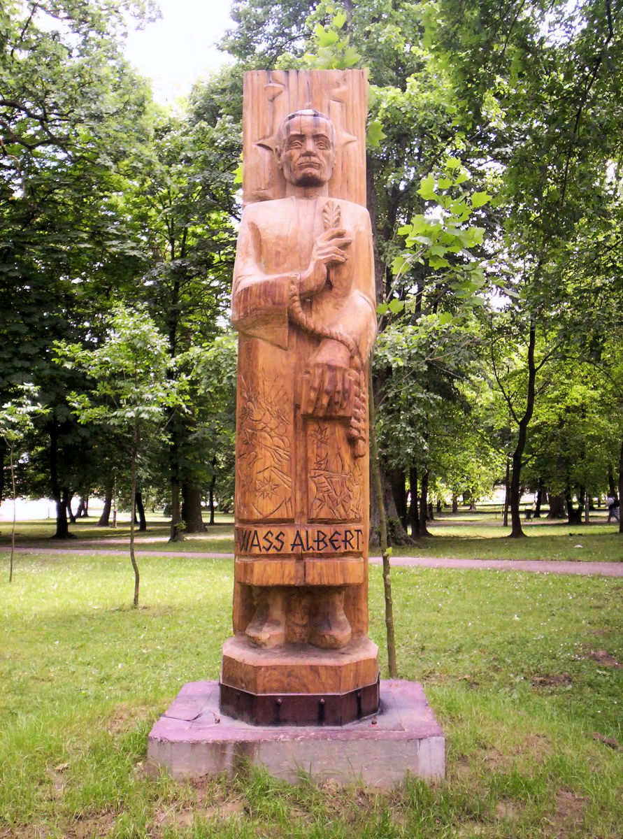 Wass Albert szobra Harkányban ; Baróthi Ádám és Baróthi Zsombor alkotása (2005) – – photo taken by uploader User:Csanády Statue of writer Albert Wass in Harkány, Hungary.